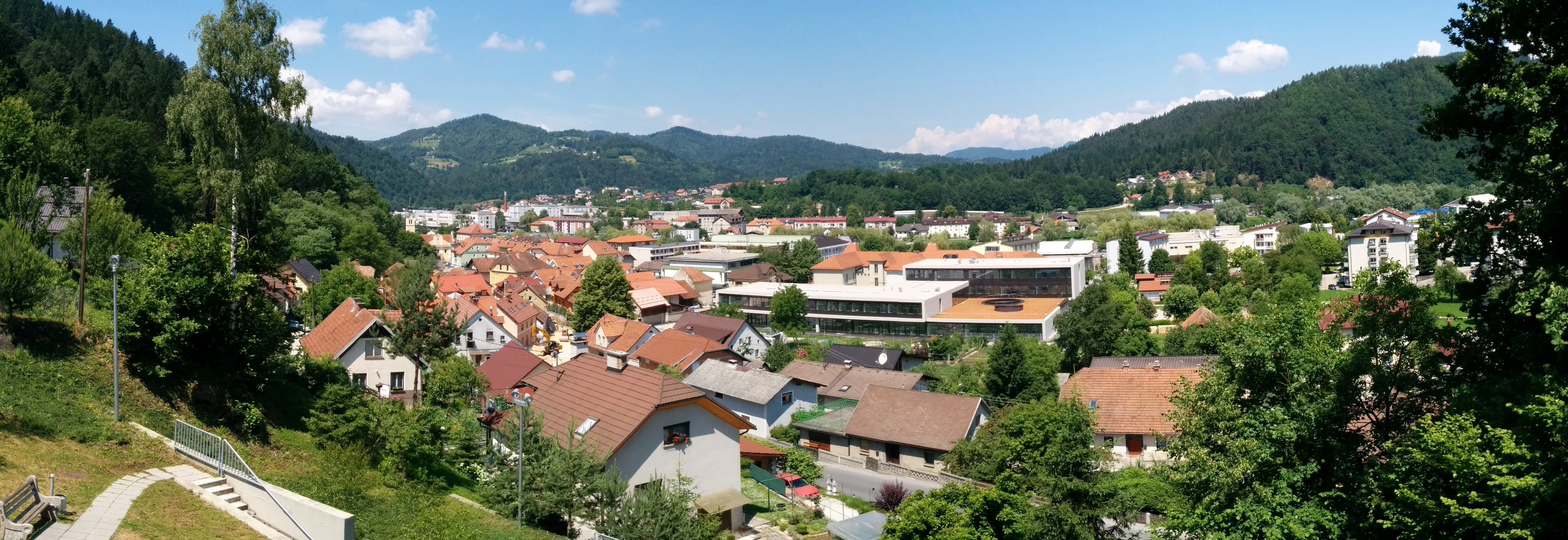 Litija, Slovenija